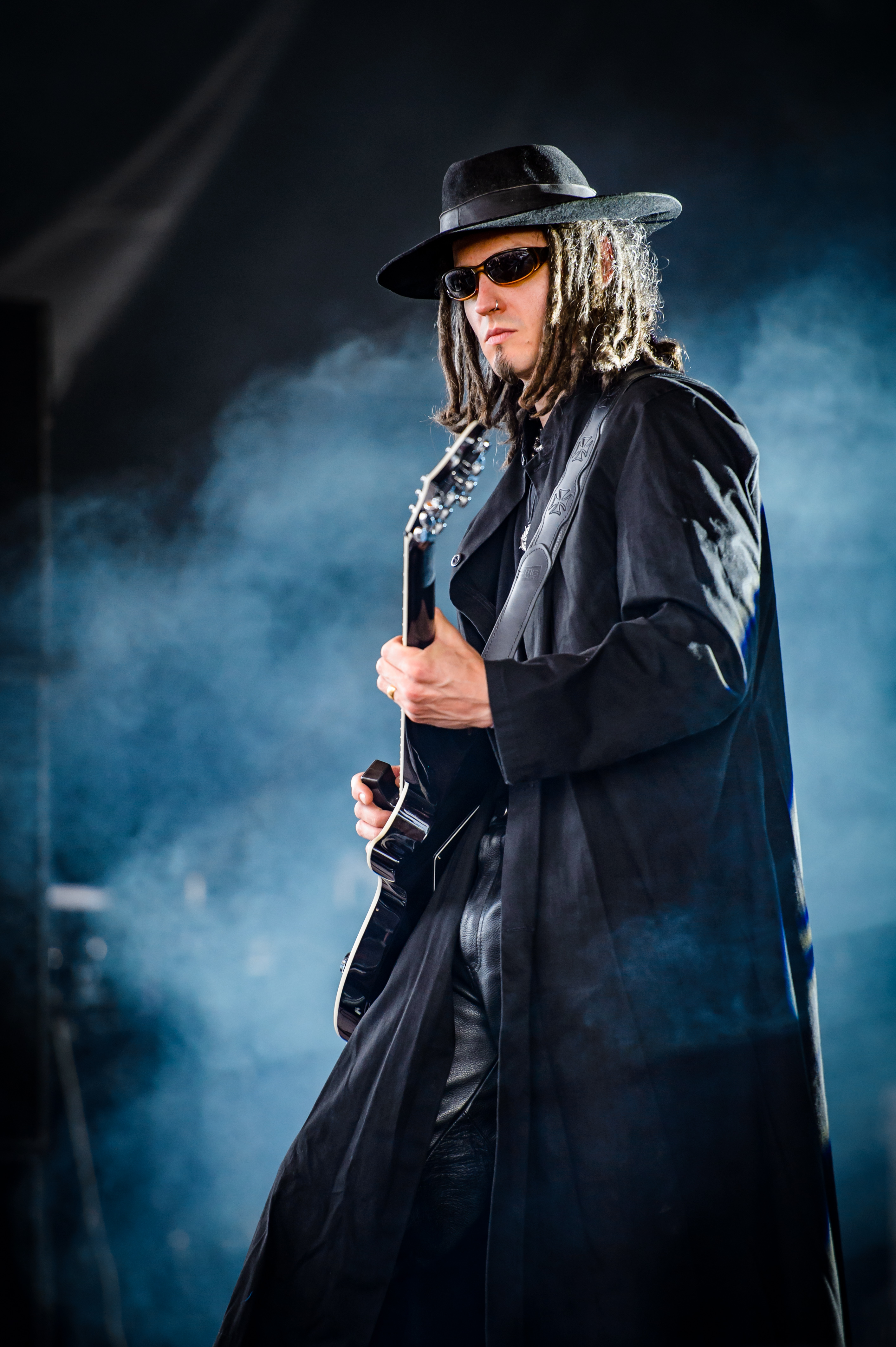 'Amphi Festival 2017; Tanzbrunnen Köln': 'Fields of the Nephilim'